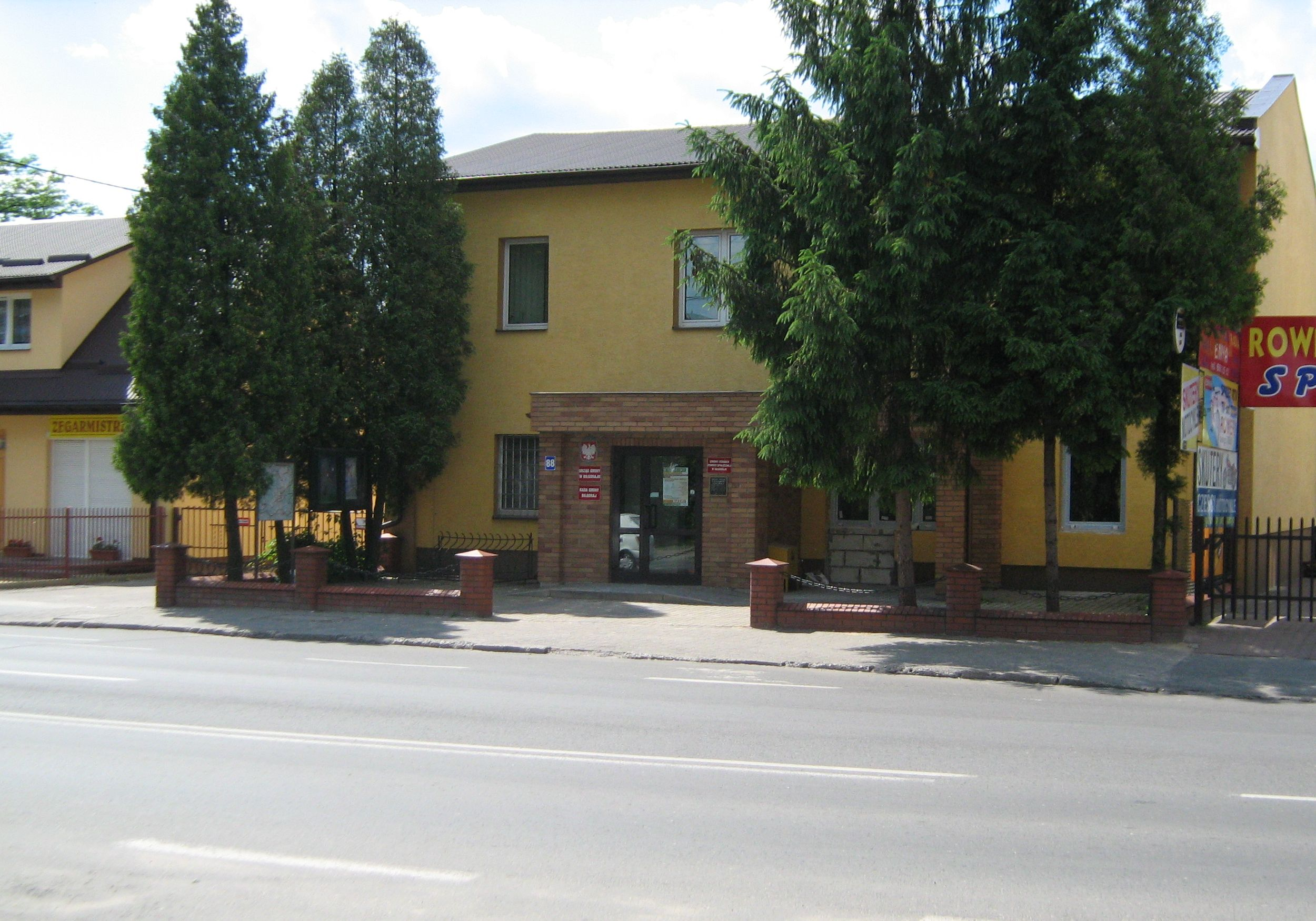 Urząd Gminy w Biłgoraju, dawniej "Delegatura Urzędu Wojewódzkiego". Autor: Piott Data wykonania: 8 czerwca 2007 r.